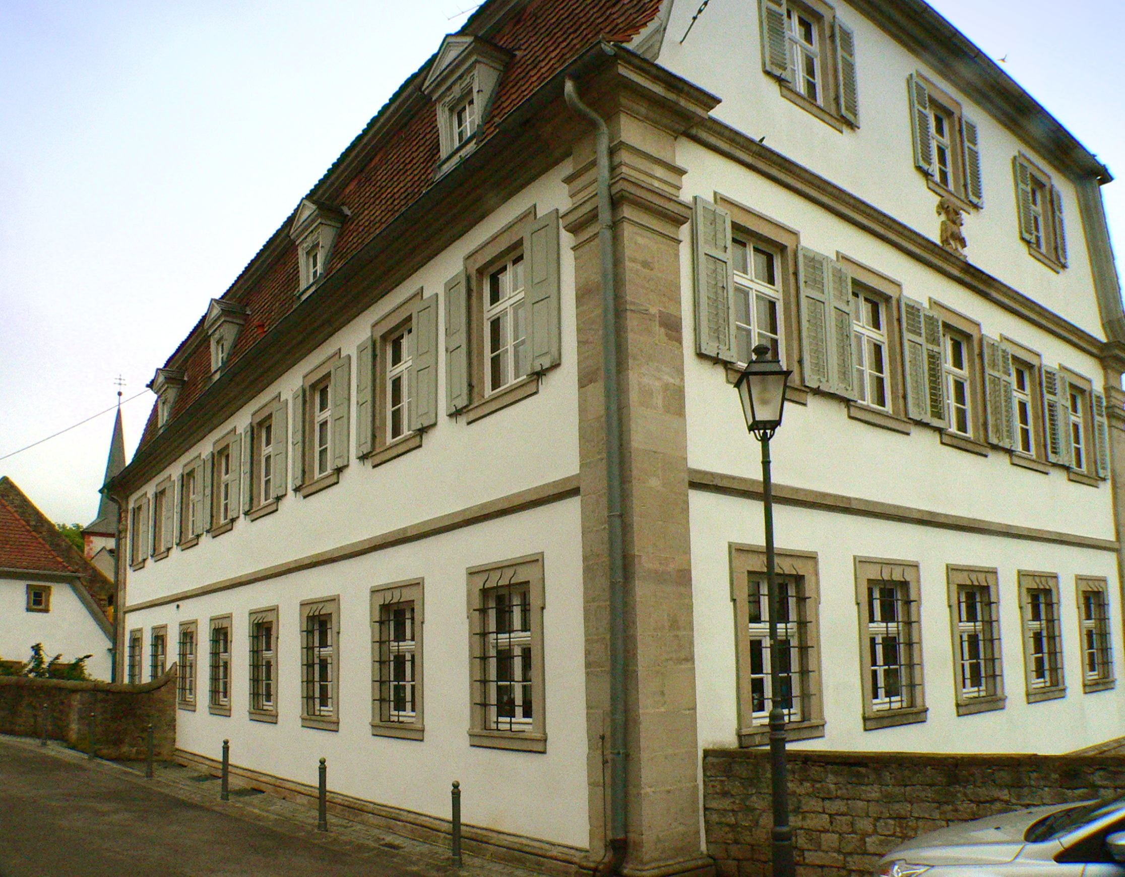 Schloss in Obertheres am Main